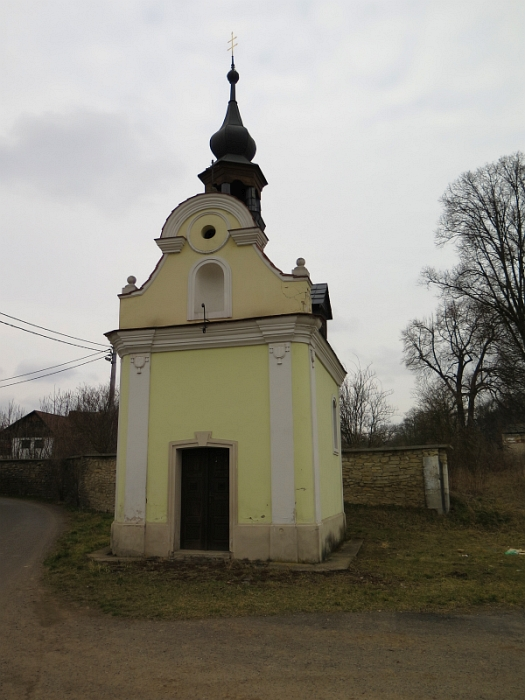 Kaple svatého Jana Nepomuckého a svatého Pavla, Čakovice, Čakovice (Štětí).